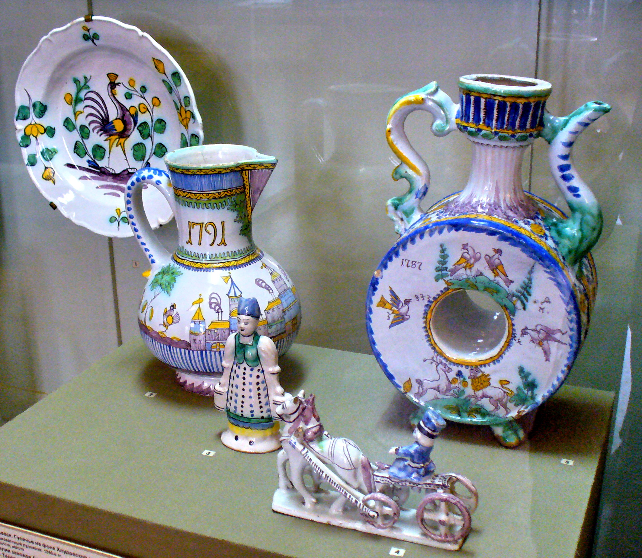 Изделия заводов Гжели, XVIII век. Майолика. Тарелка с петухом, кувшин, статуэтка "Баба с вёдрами", статуэтка "Щёголь в дрожках", квасник.